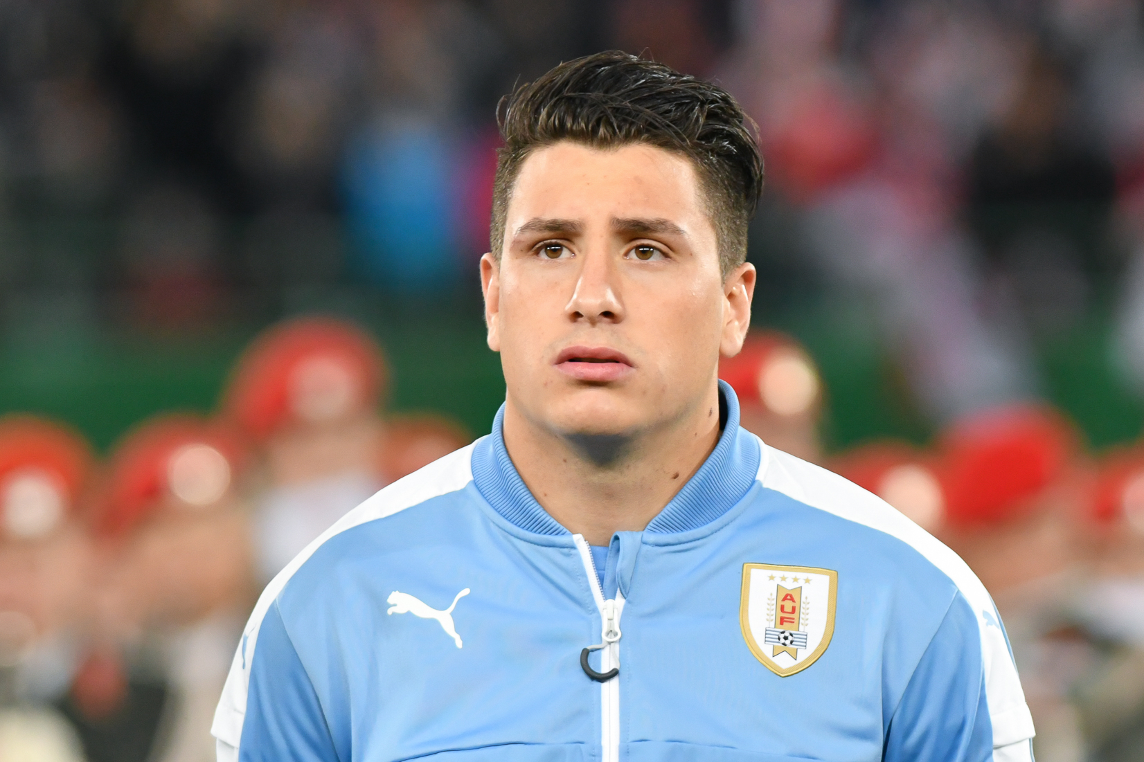 Wien, Österreich, 14.11.2017, Sport, Fussball, OEFB Freundschaftliches Laenderspiel - Österreich vs Uruguay. Bild zeigt Jose Maria Gimenez (URU).